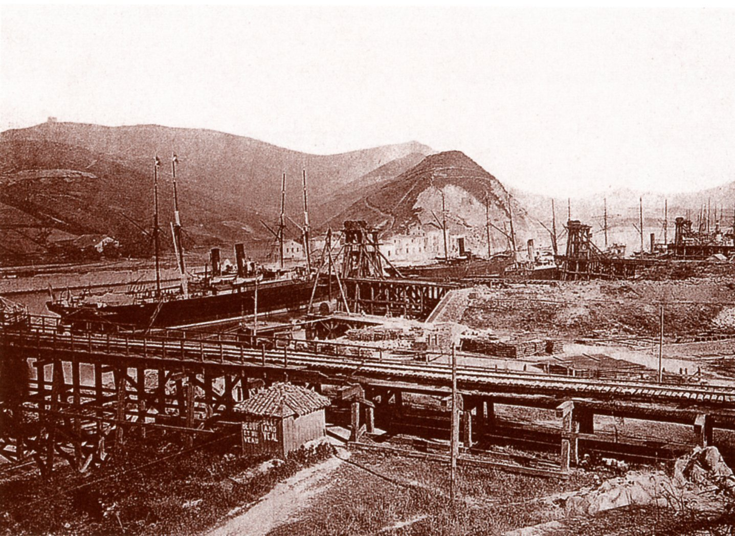 Orconerako kargalekua, 1880